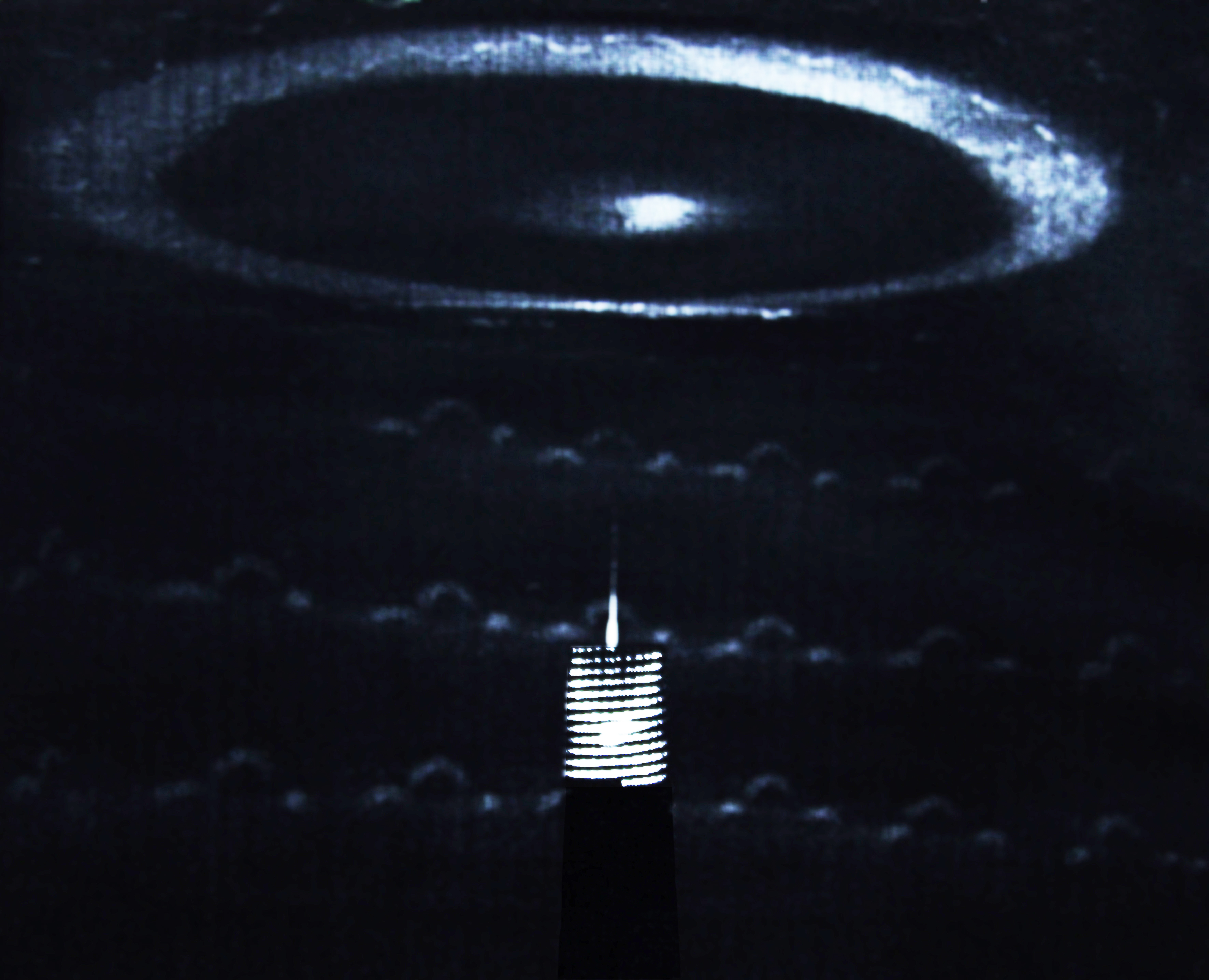 Imagineskop – instalacja artystyczna wykonana w inspiracji „Wstępu do Imagineskopii” Śledzia Otrembusa Podgrobelskiego